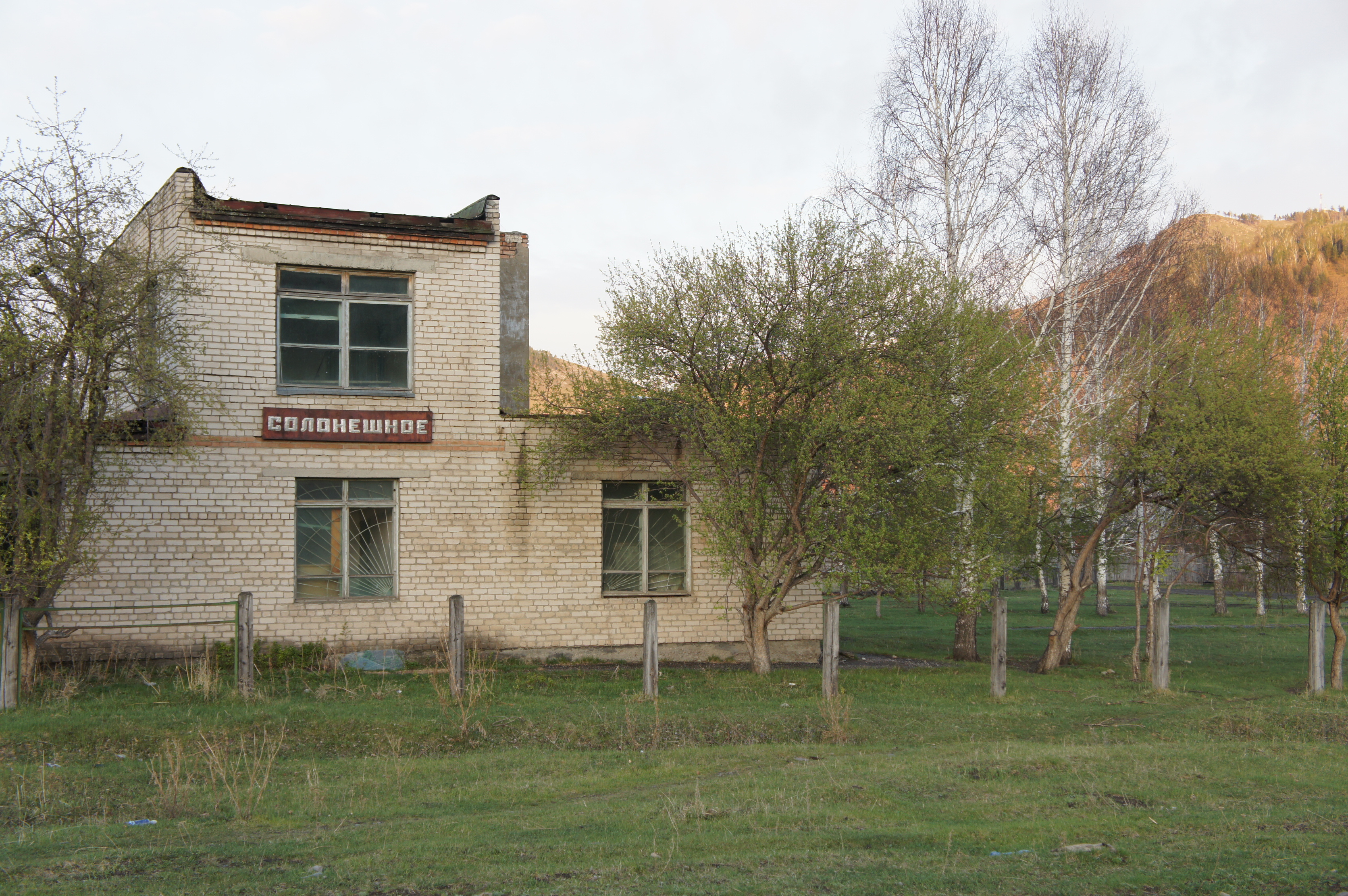 Здание аэровокзала в с. Солонешное. Май 2012